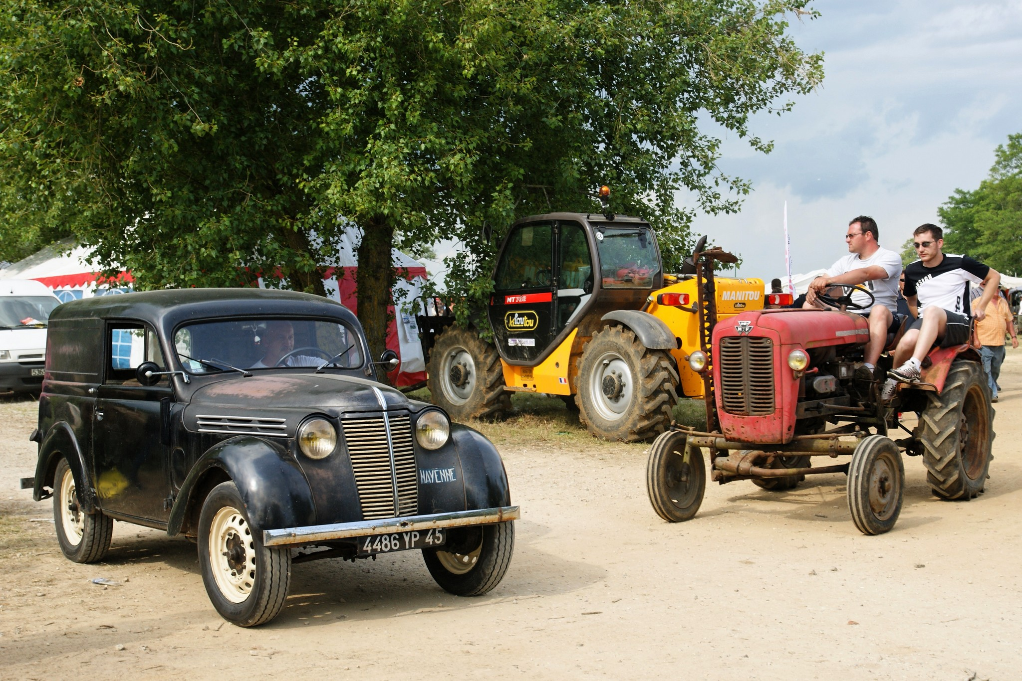 de vieux cousins et cousines vues à "La locomotion en fête" dans l'Essonne